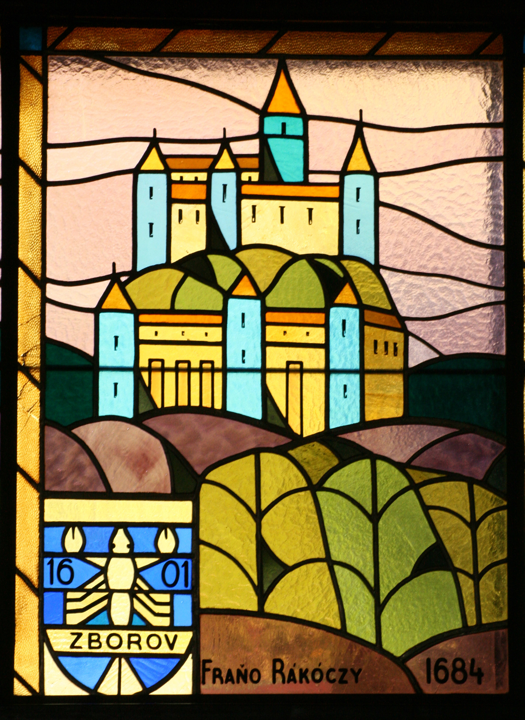 Autorom vitráže v interiéri PKO v Bratislave v roku 1957 bol národný umelec Janko Alexy